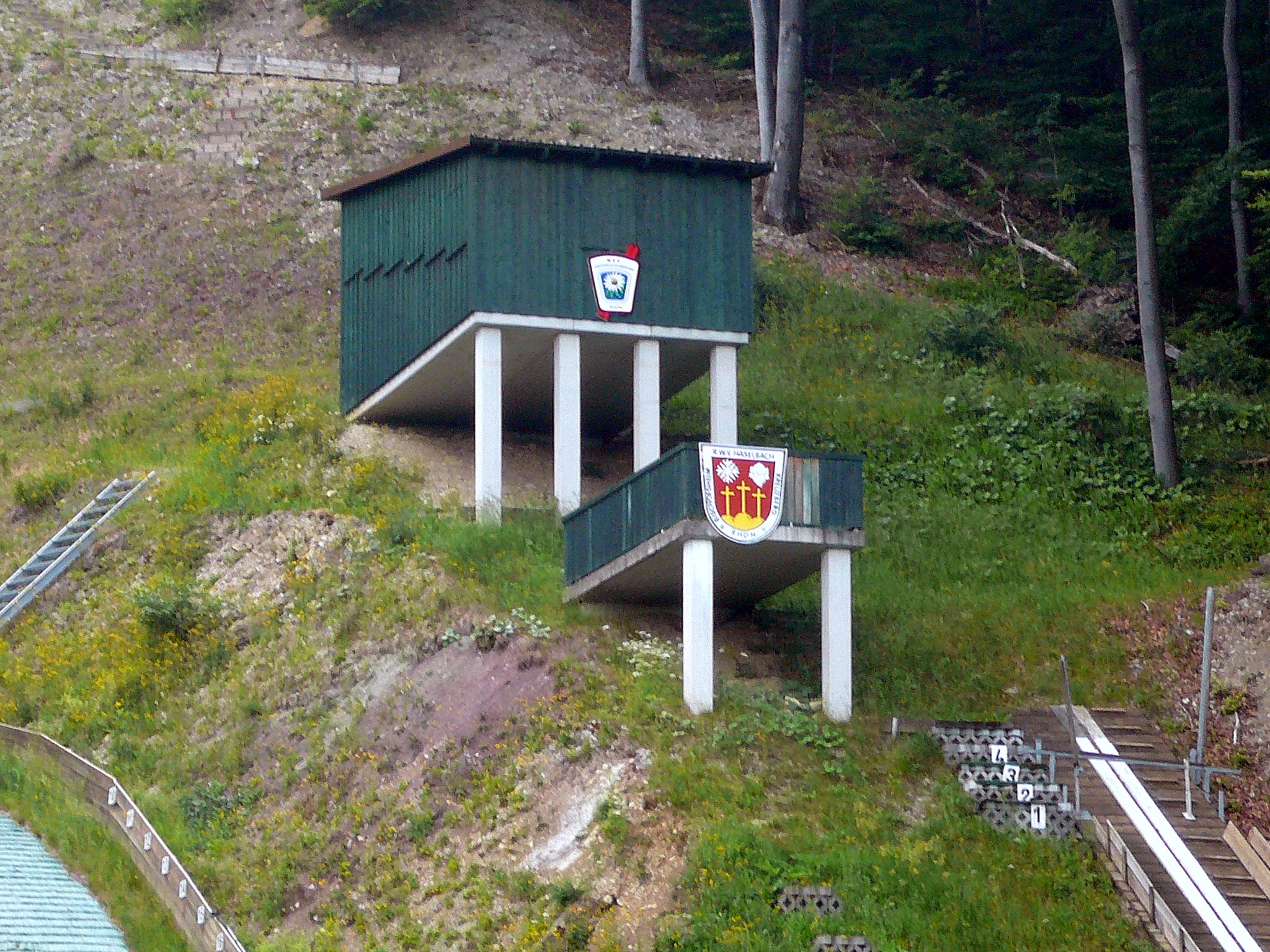 Kreuzbergschanze in Haselbach, Sprungrichterplattform